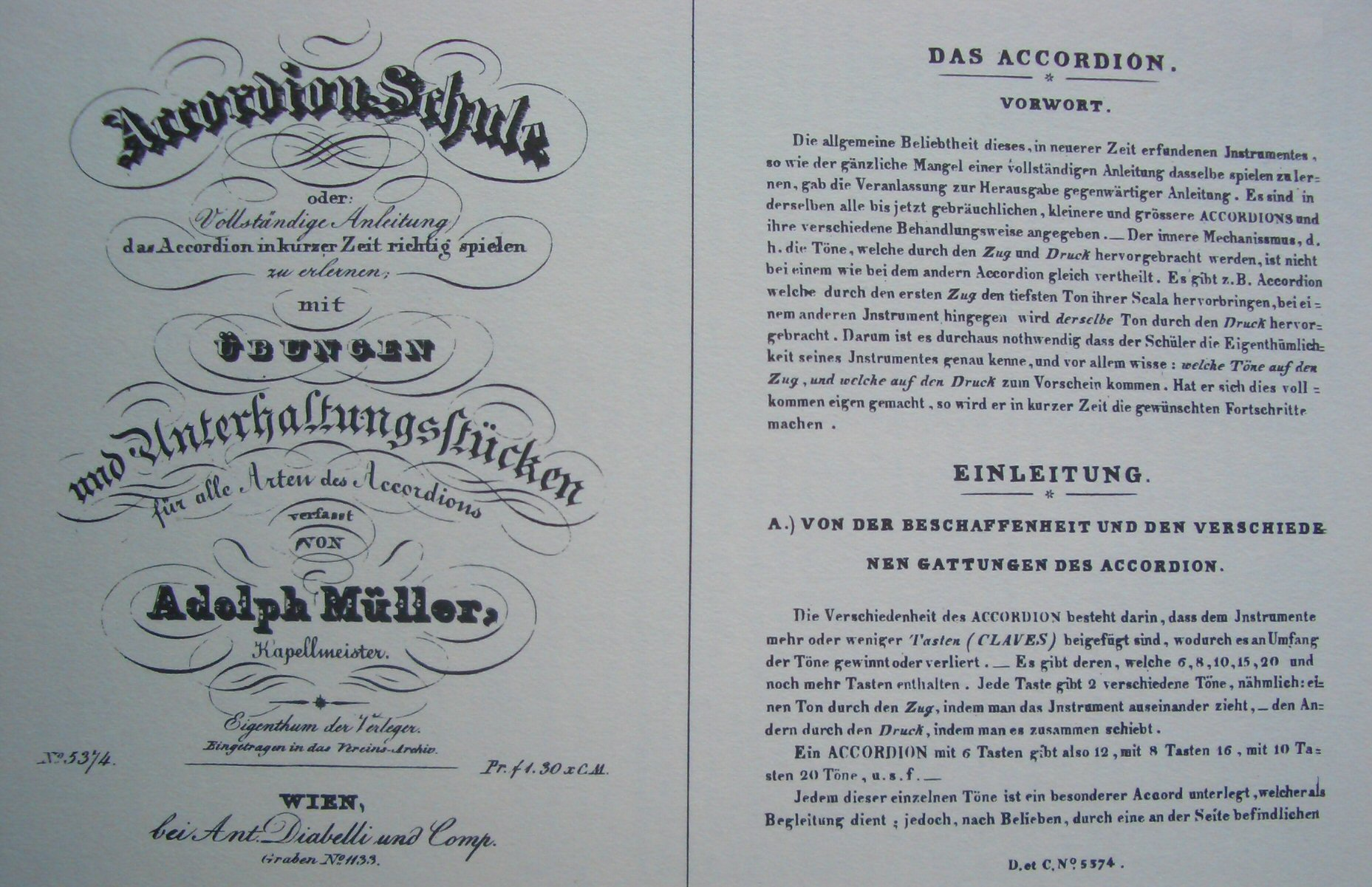 Schule für Accordion – Kopie Seite 1-2